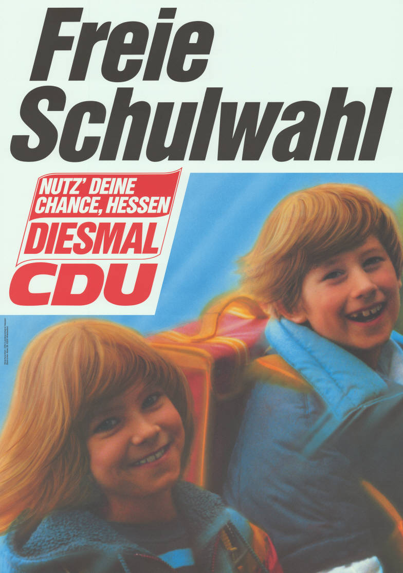 Freie Schulwahl Nutz' Deine Chance, Hessen Diesmal CDU Abbildung: Schulkinder Plakatart: Motiv-/Textplakat Auftraggeber: Verantw.: CDU-Landesverband Hessen, Wiesbaden Objekt-Signatur: 10-007 : 702 Bestand: Landtagswahlplakate Hessen (10-007) GliederungBestand10-18: Landtagswahlplakate Hessen (10-007) » CDU Lizenz: KAS/ACDP 10-007 : 702 CC-BY-SA 3.0 DE